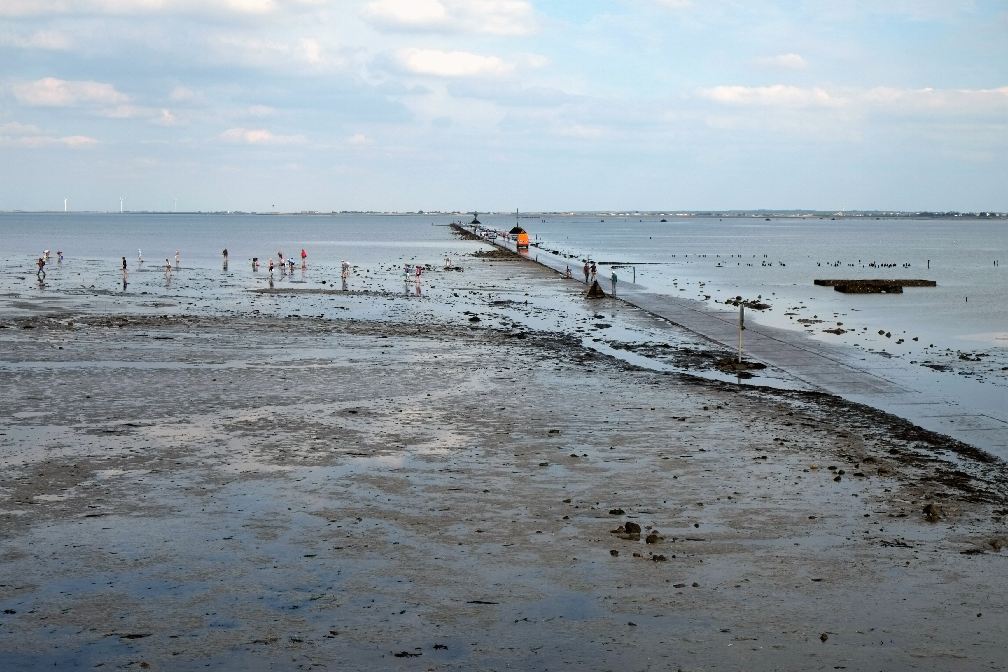 Passage du Gois île de Noirmoutier Vendée France